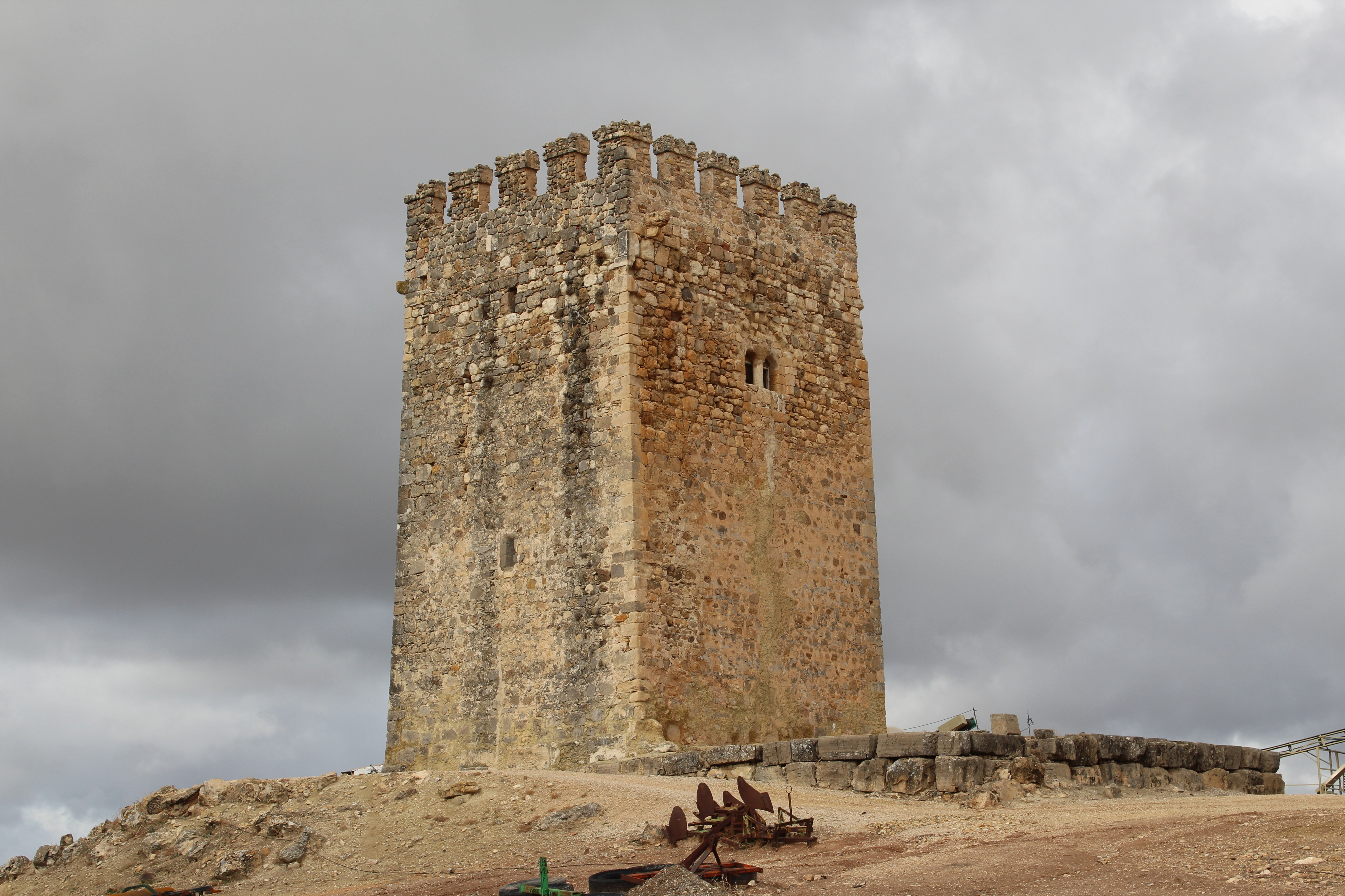 El castillo de Fuencubierta visto desde el SE.